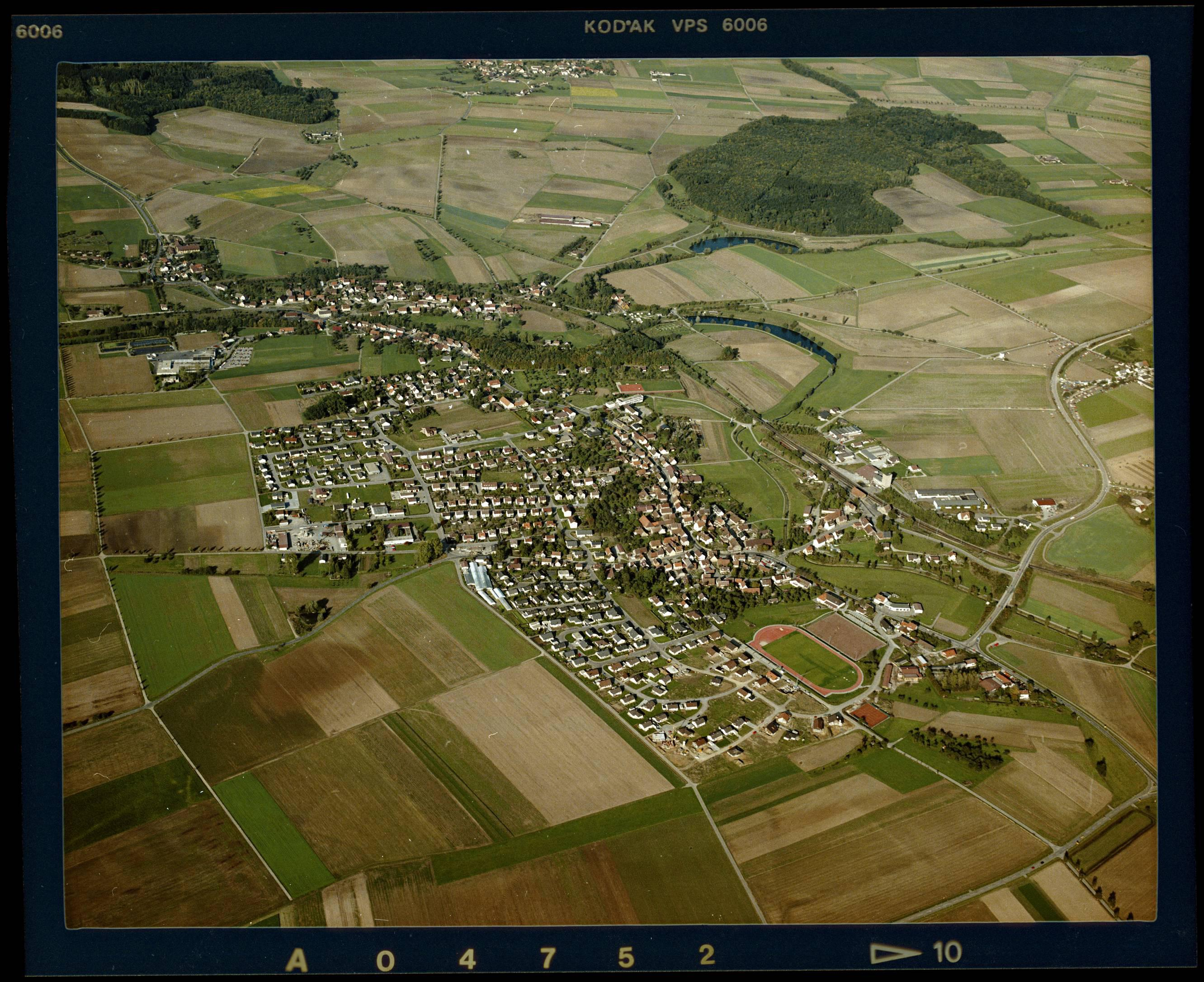 Luftbild von Rot am See - Staatsarchiv Sigmaringen - Archivalieneinheit N 1/96 T 1 Nr. 612